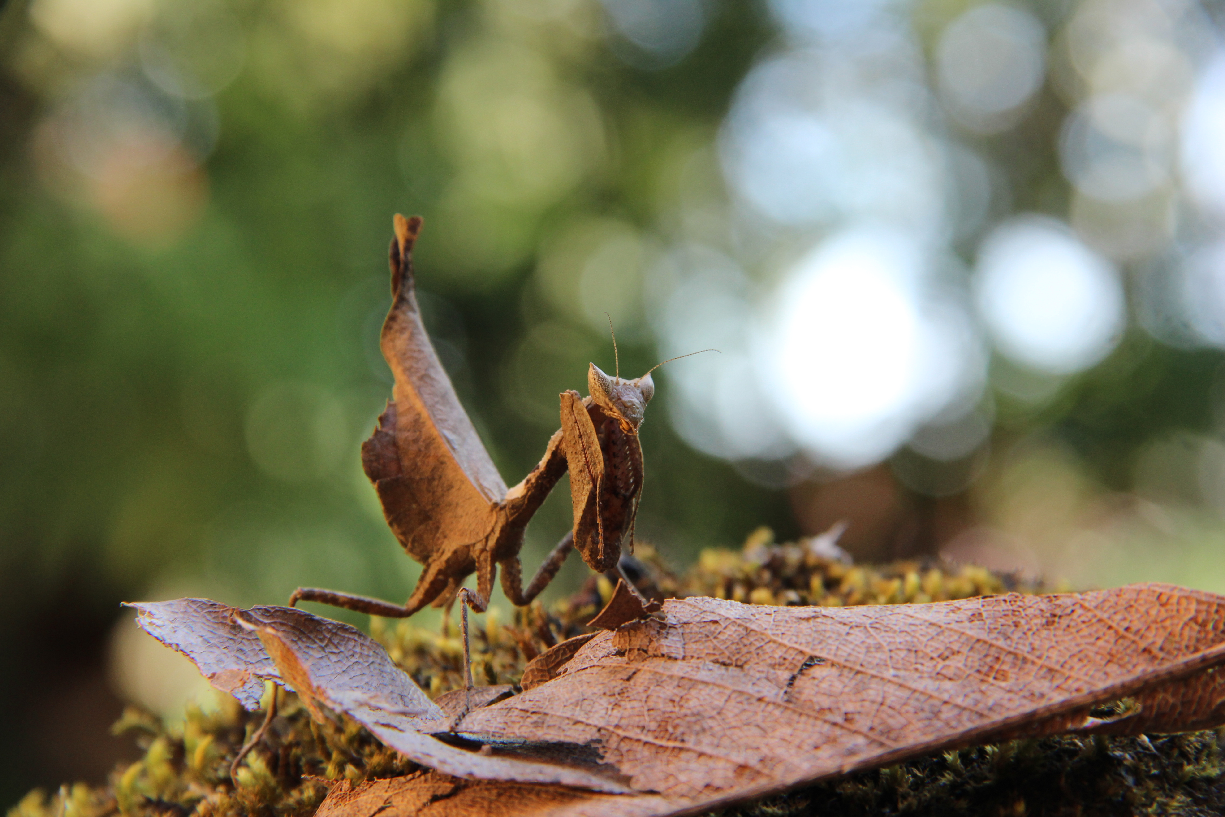 Esse pequeno inseto da ordem Mantodea estava caçando no quintal de uma residência no bairro Rio Bonito, nos arredores da cidade de Joinville.